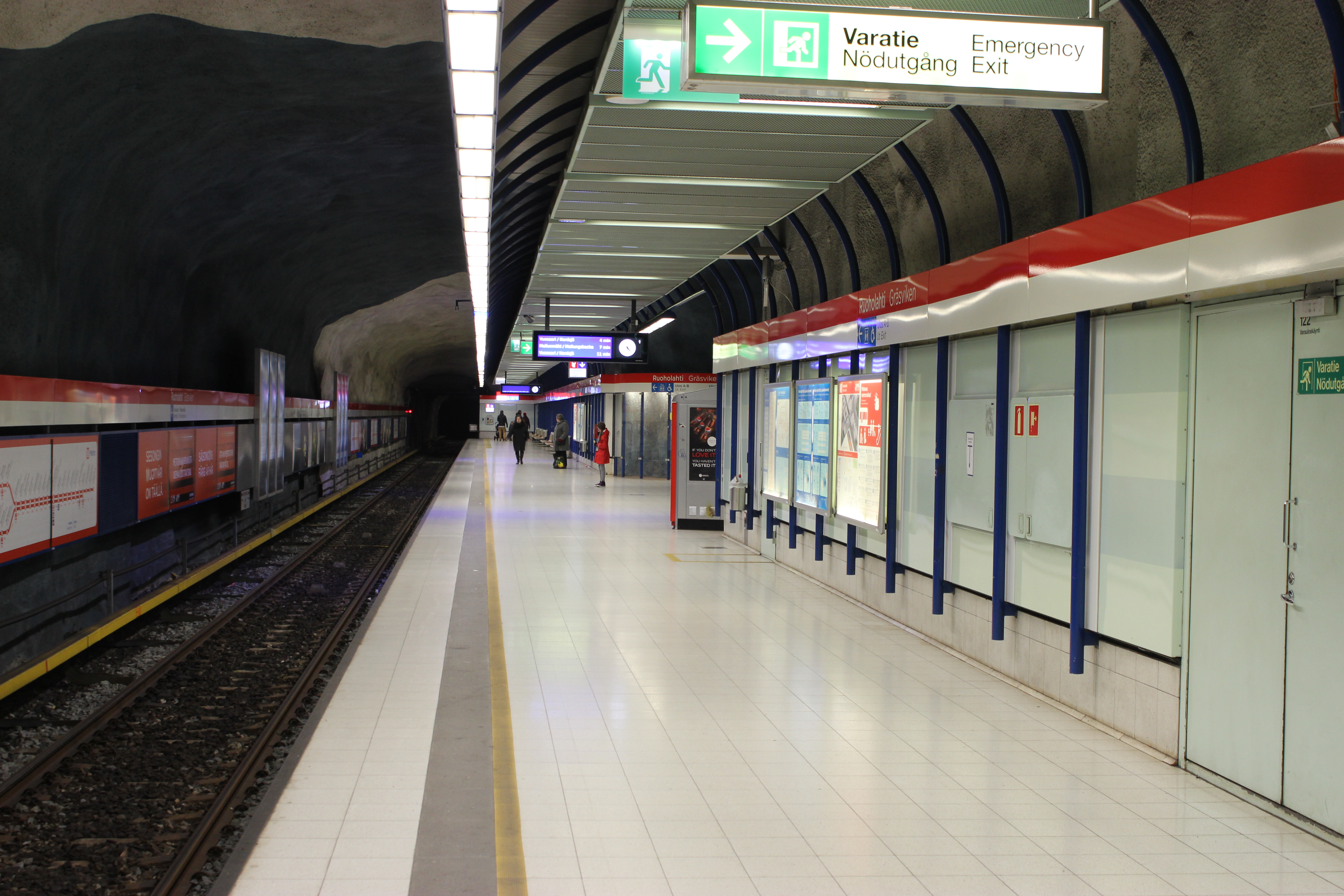 Ruoholahden metroasema marraskuussa 2017.